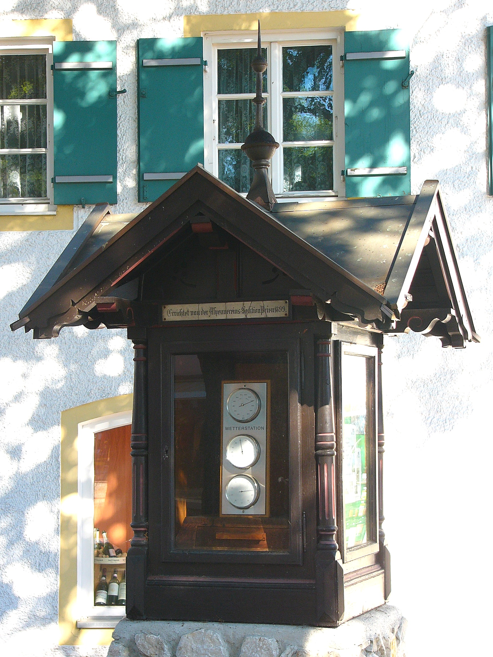 Wettersäule, kleines Holzgehäuse auf Natursteinpfeiler mit metereologischen Instrumenten und Anzeigern, bez. 1899.This is a photograph of an architectural monument.